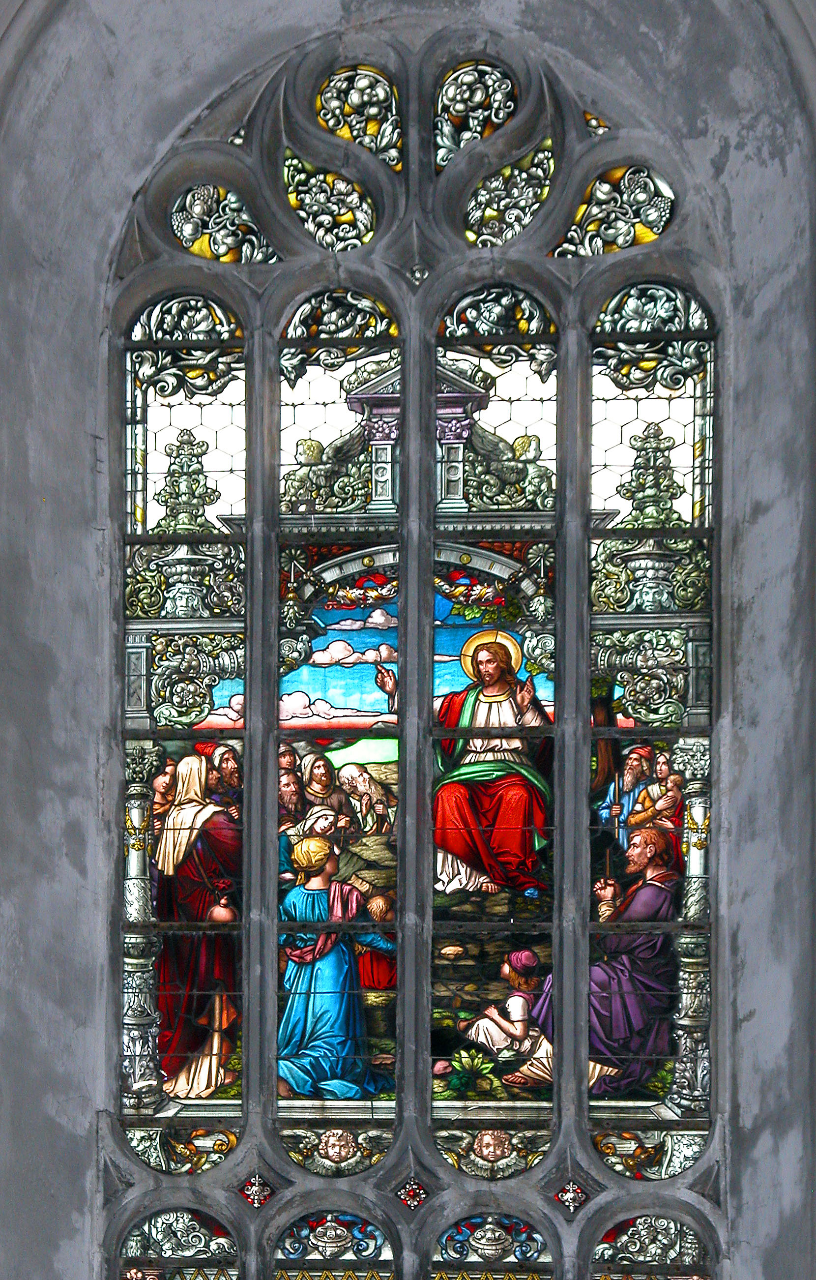 16.06.2004 09406 Marienberg, Marienstraße (GMP: 50.650456,13.165675): St. Marien Kirche. Spätgotischer Bau (1558-1564). Westlichstes Chorfenster in der Südwand. [DSCN3865.TIF]20040616200DR.JPG(c)Blobelt